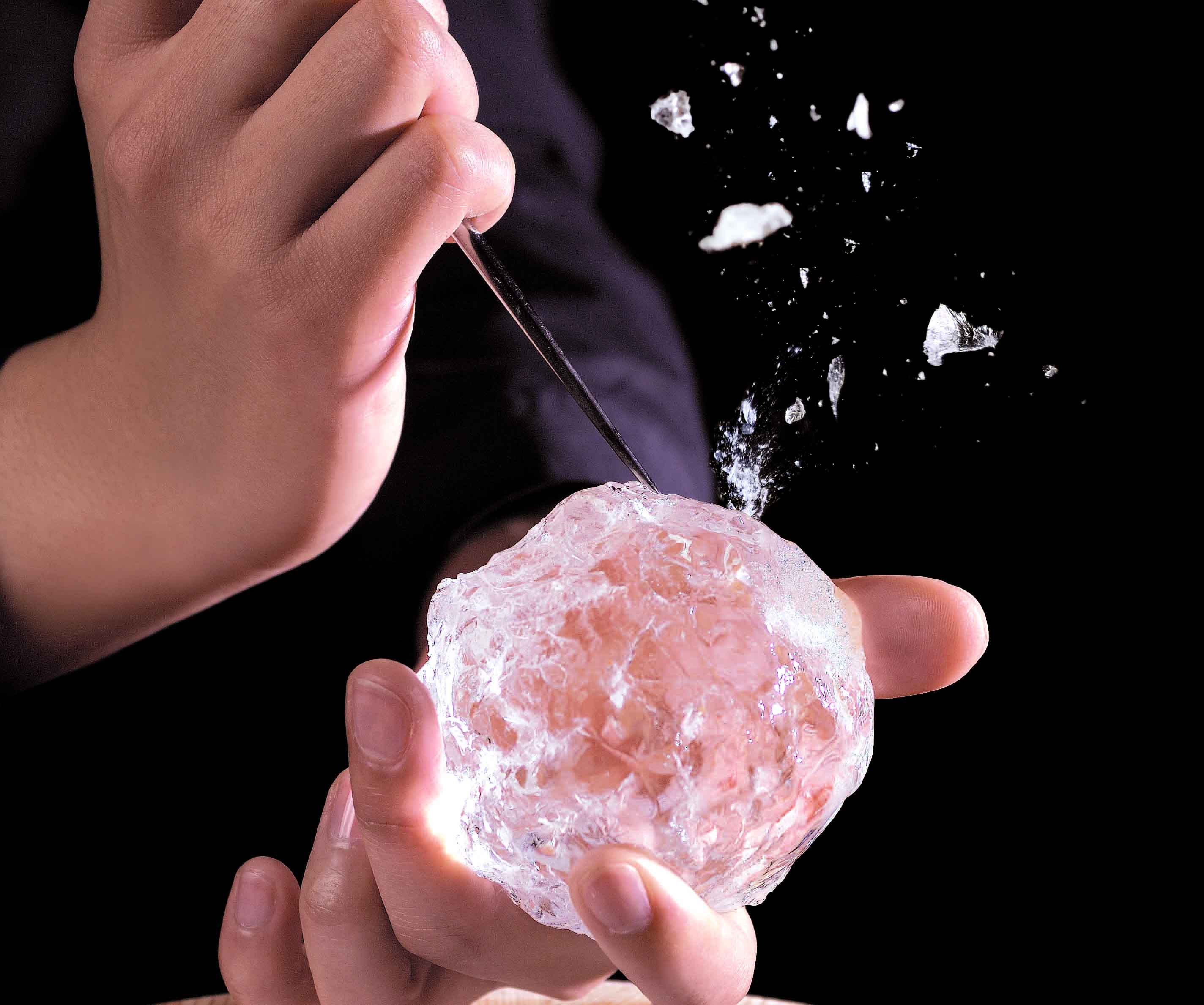 バーテンダーはアイスピック１本でボールアイスを作っていく